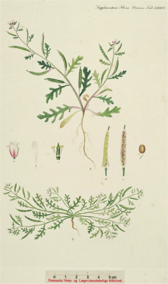 Sisymbrium supinum